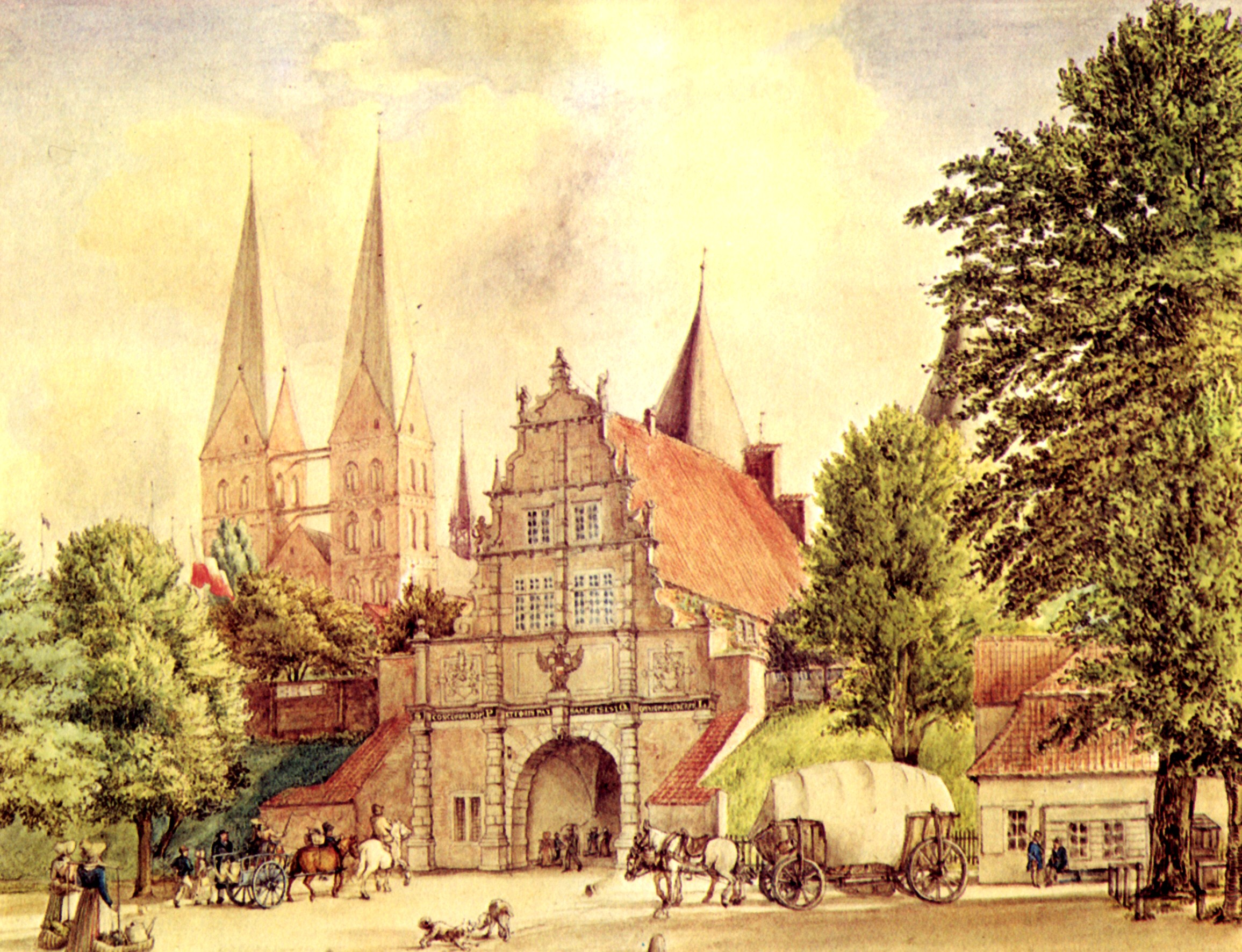 Das äußere Holstentor in Lübeck (erbaut 1585, abgebrochen 1853) Lizenz